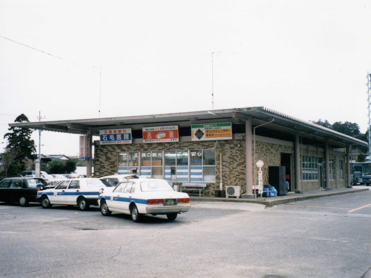 Kashima Bus Terminal 鹿島バスターミナル